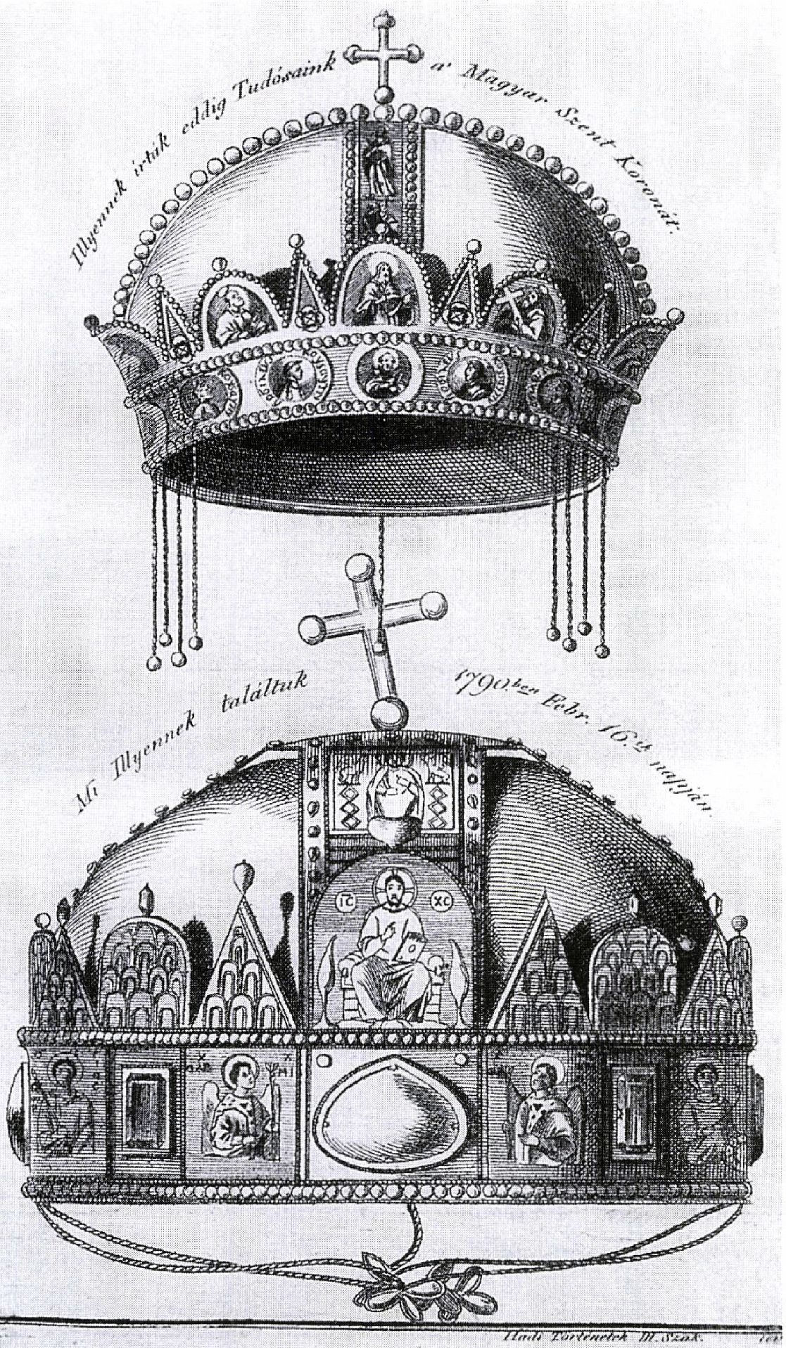 Az alsó kép a Szent Korona 1790-es vizsgálata alapján készült. A felső kép Révay Péter koronaőr 1613-ban megjelent könyvének illusztrációját másolja